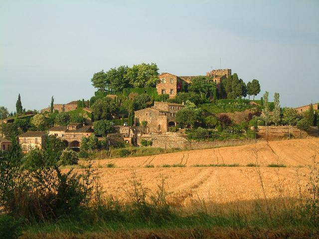 Castell de Foixà